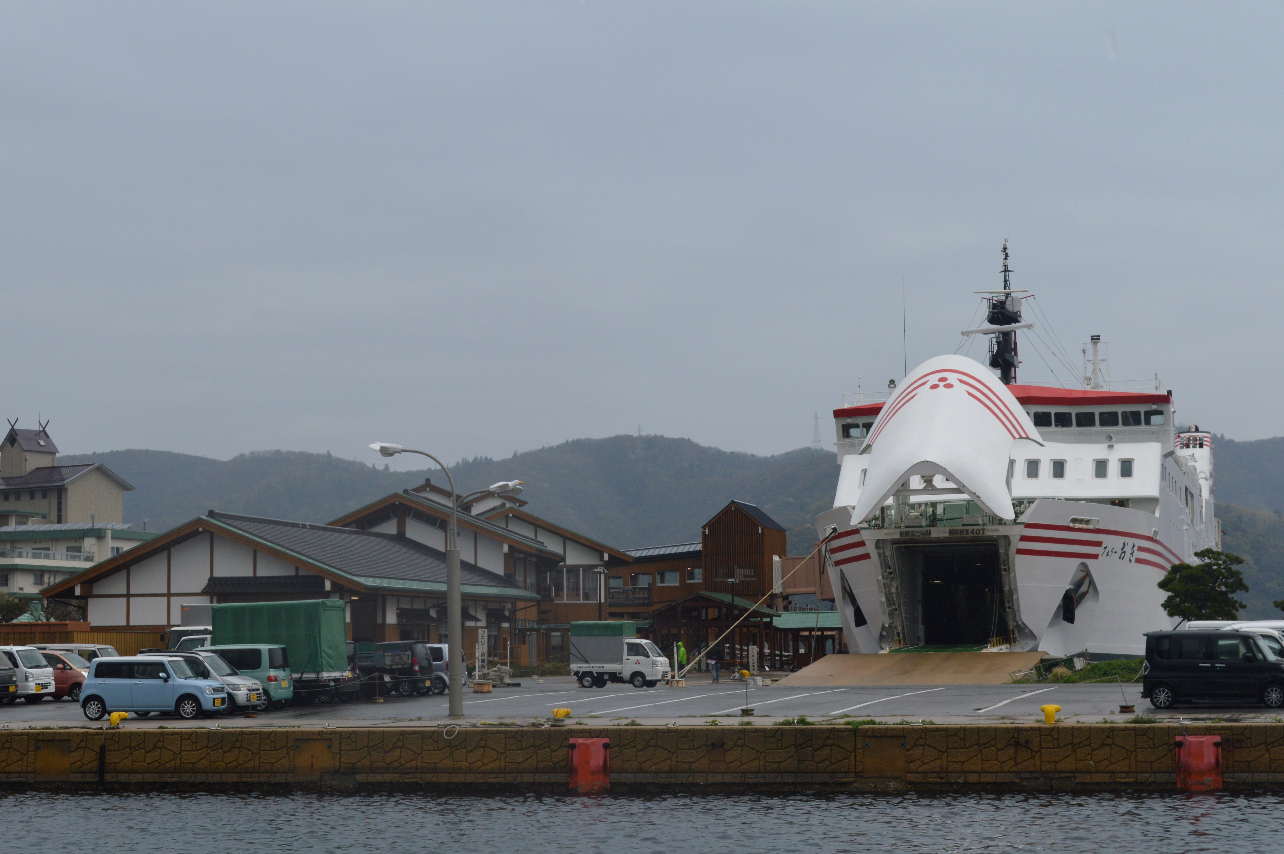 隠岐汽船のフェリーおき。島根県隠岐郡海士町の菱浦港に停泊中。左はキンニャモニャセンター。